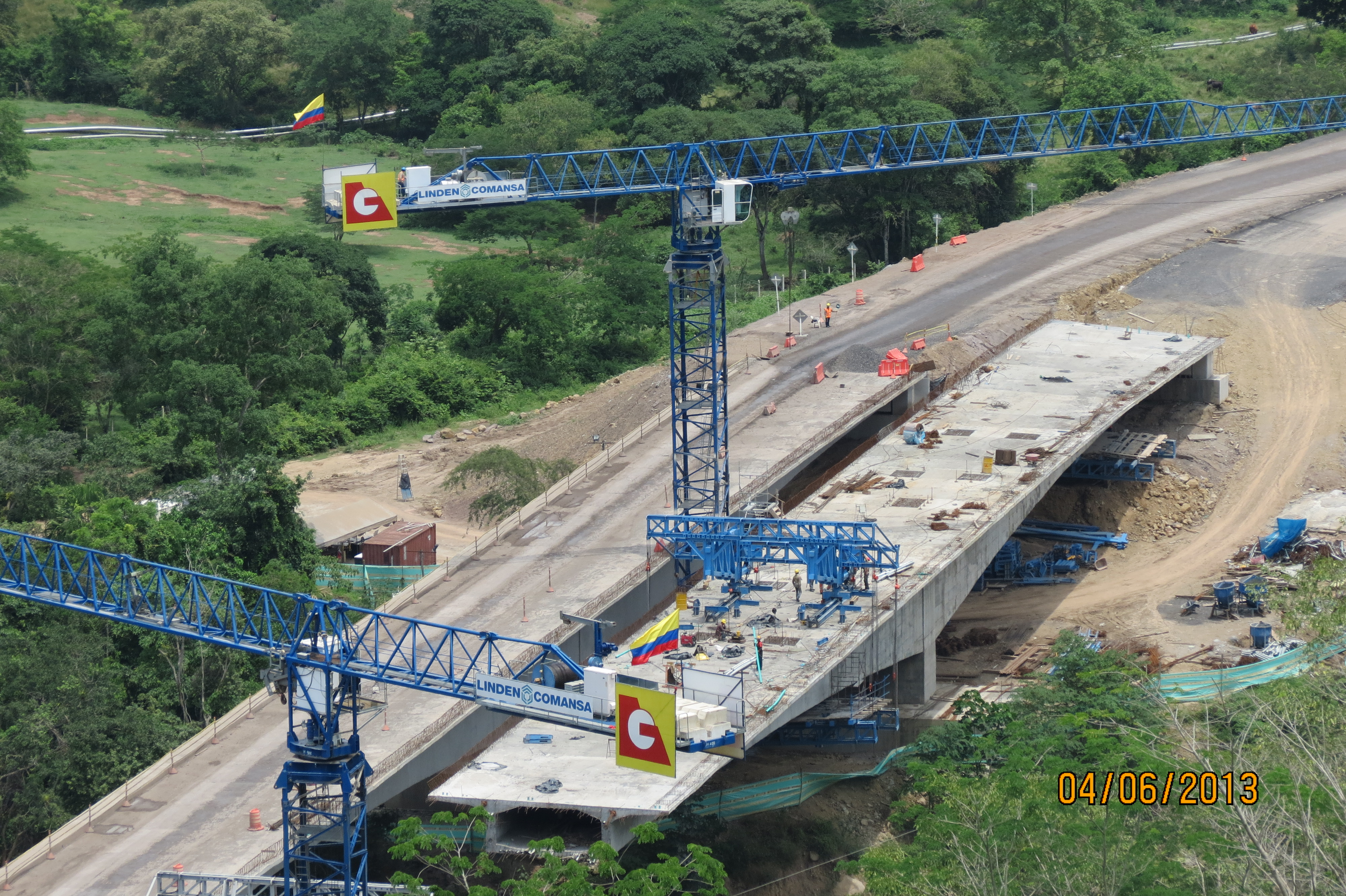 Construccion Puentes